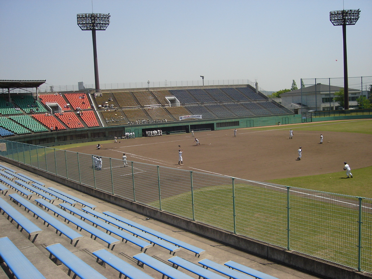 倉敷市営球場。 - 日本国岡山県倉敷市にある競技場。